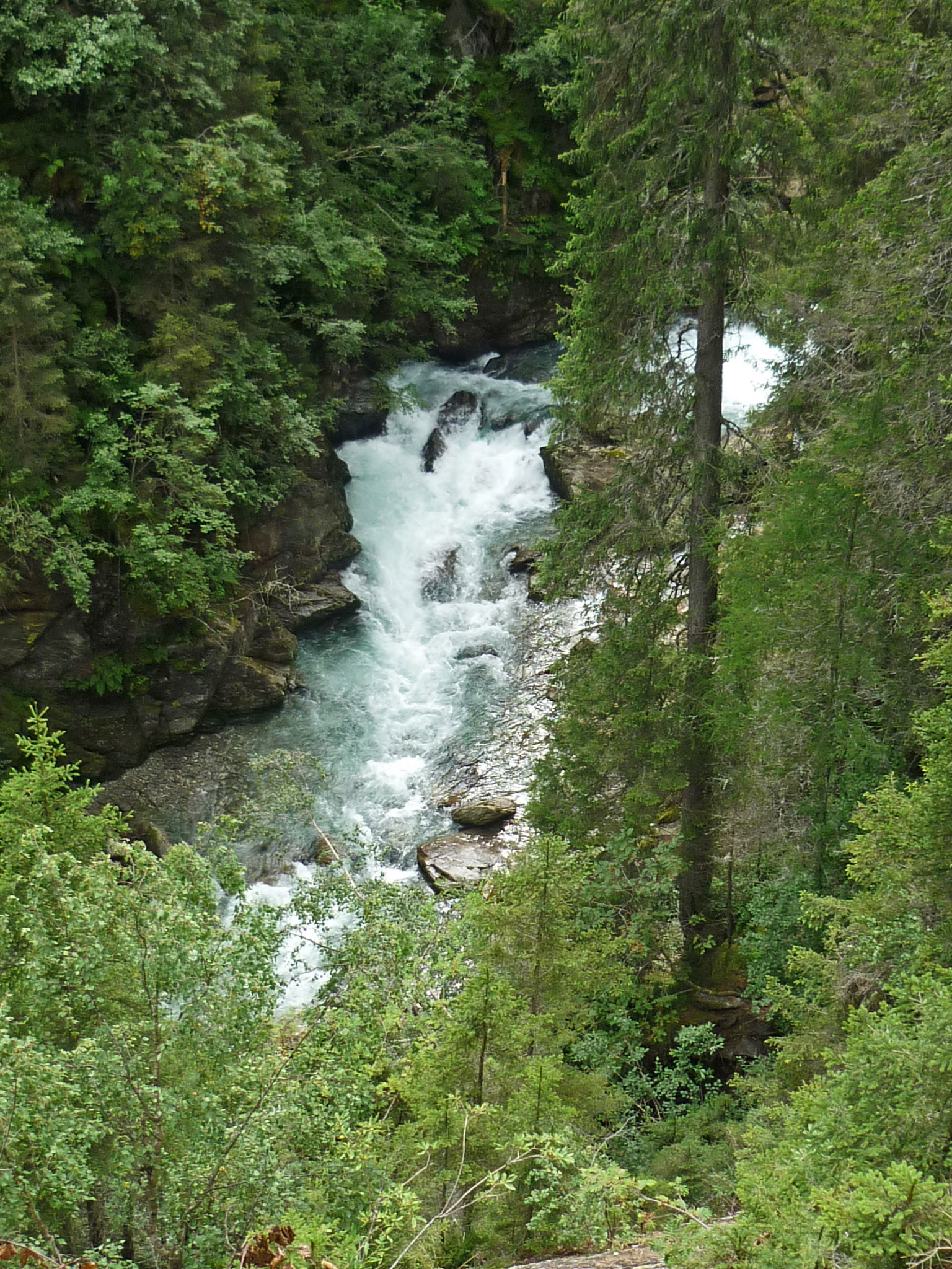 Rosannaschlucht im Verwall bei St. Johann am Arlberg, Tirol